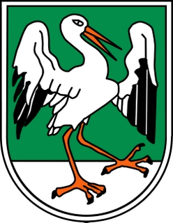 Wappen